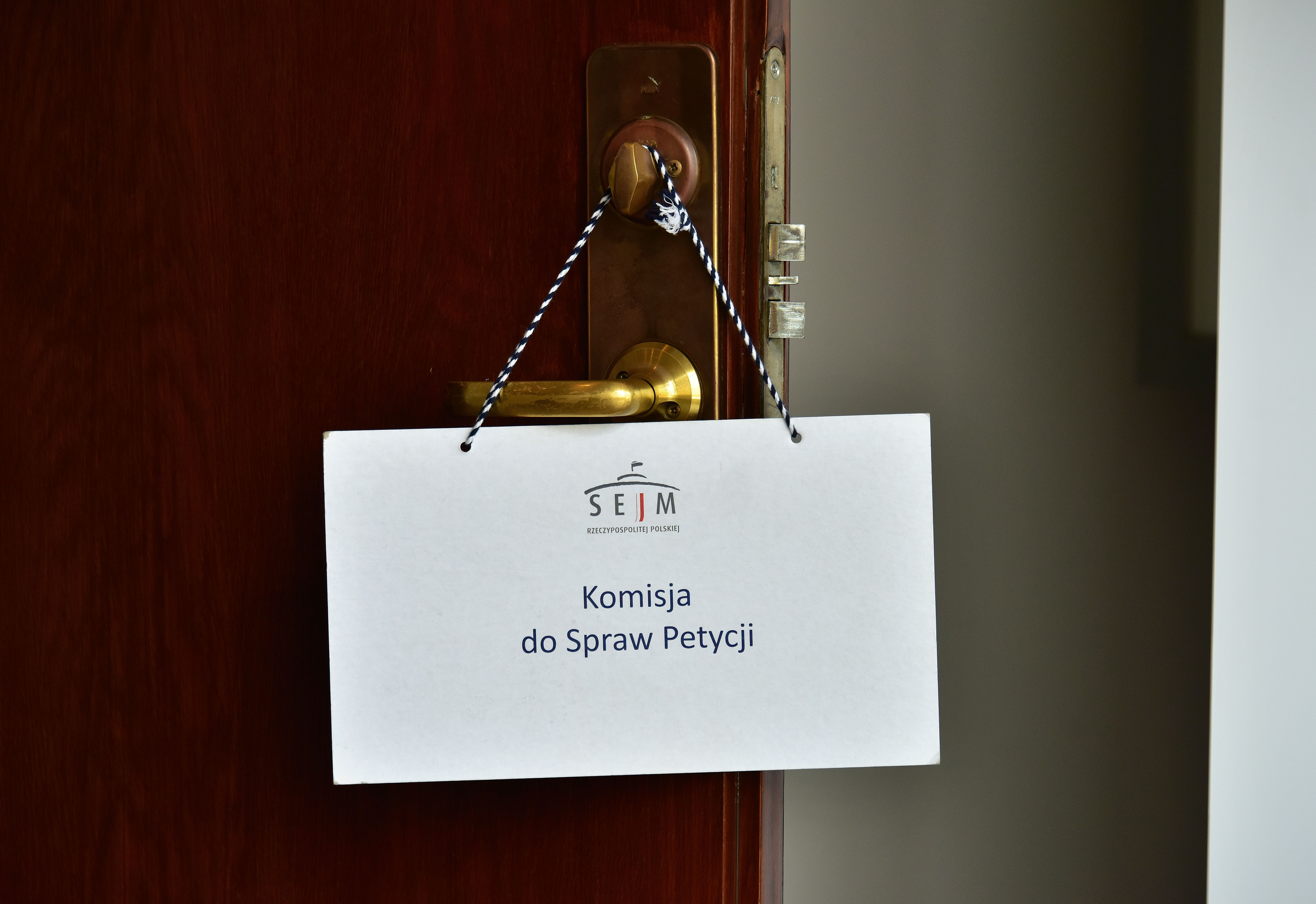 Sejm RP. Wywieszka o trwającym posiedzeniu Komisji ds. Petycji